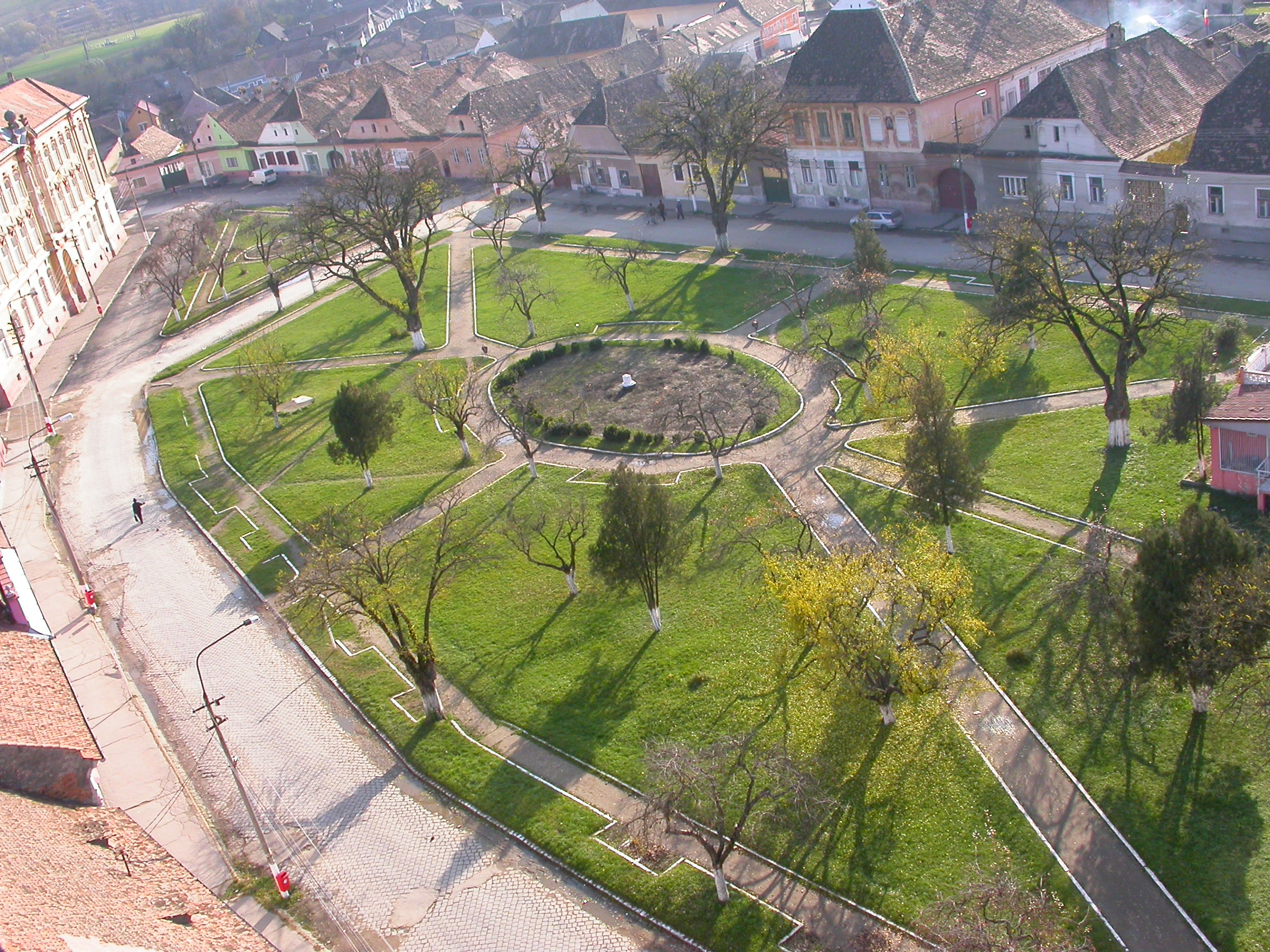 Biserica armeano-catolică "Sf. Elisabeta", 1766 - 1791